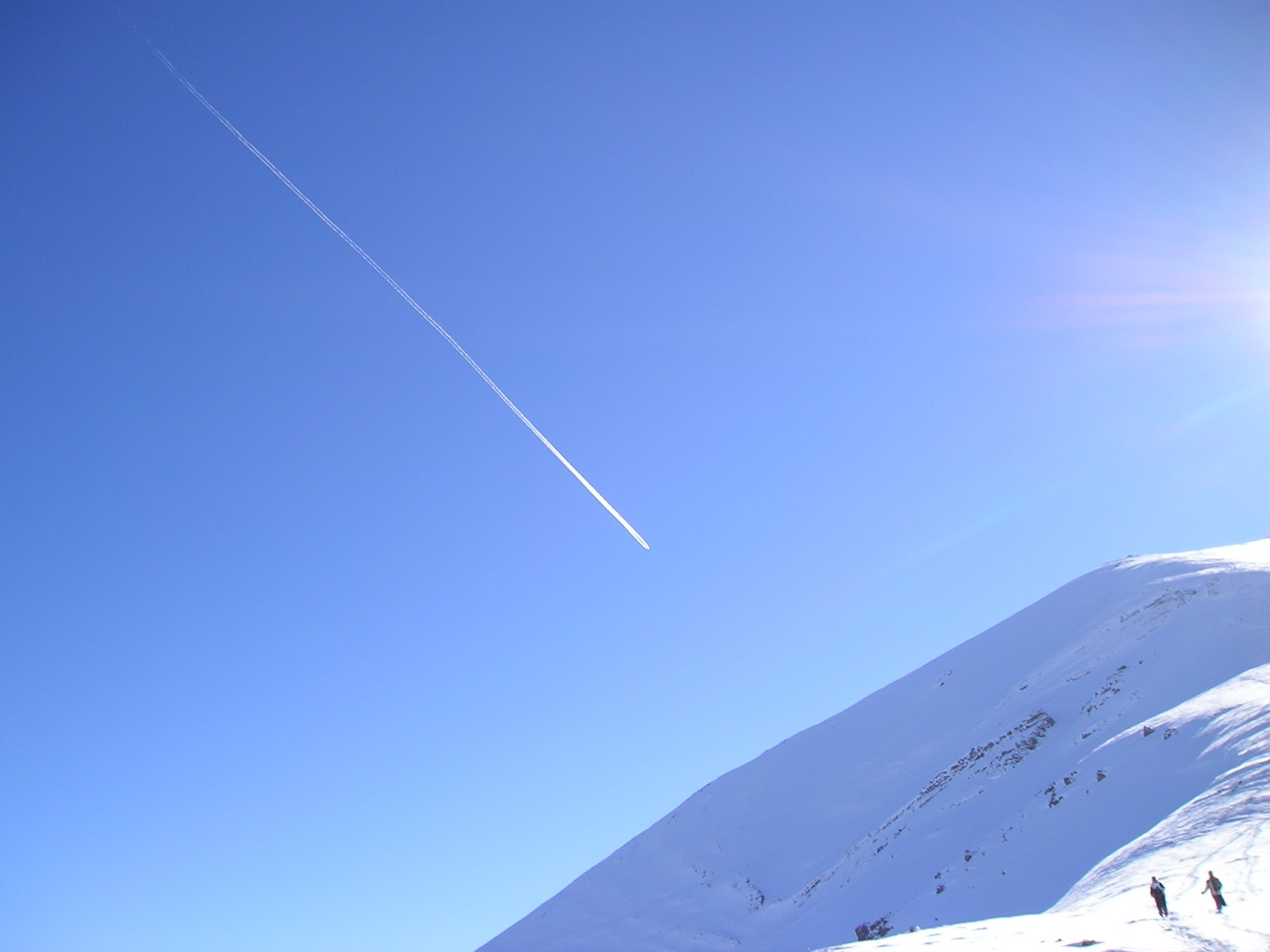 Khaton Bargah Neck and Plane هواپیمابرفرازگردنه خاتون بارگاه